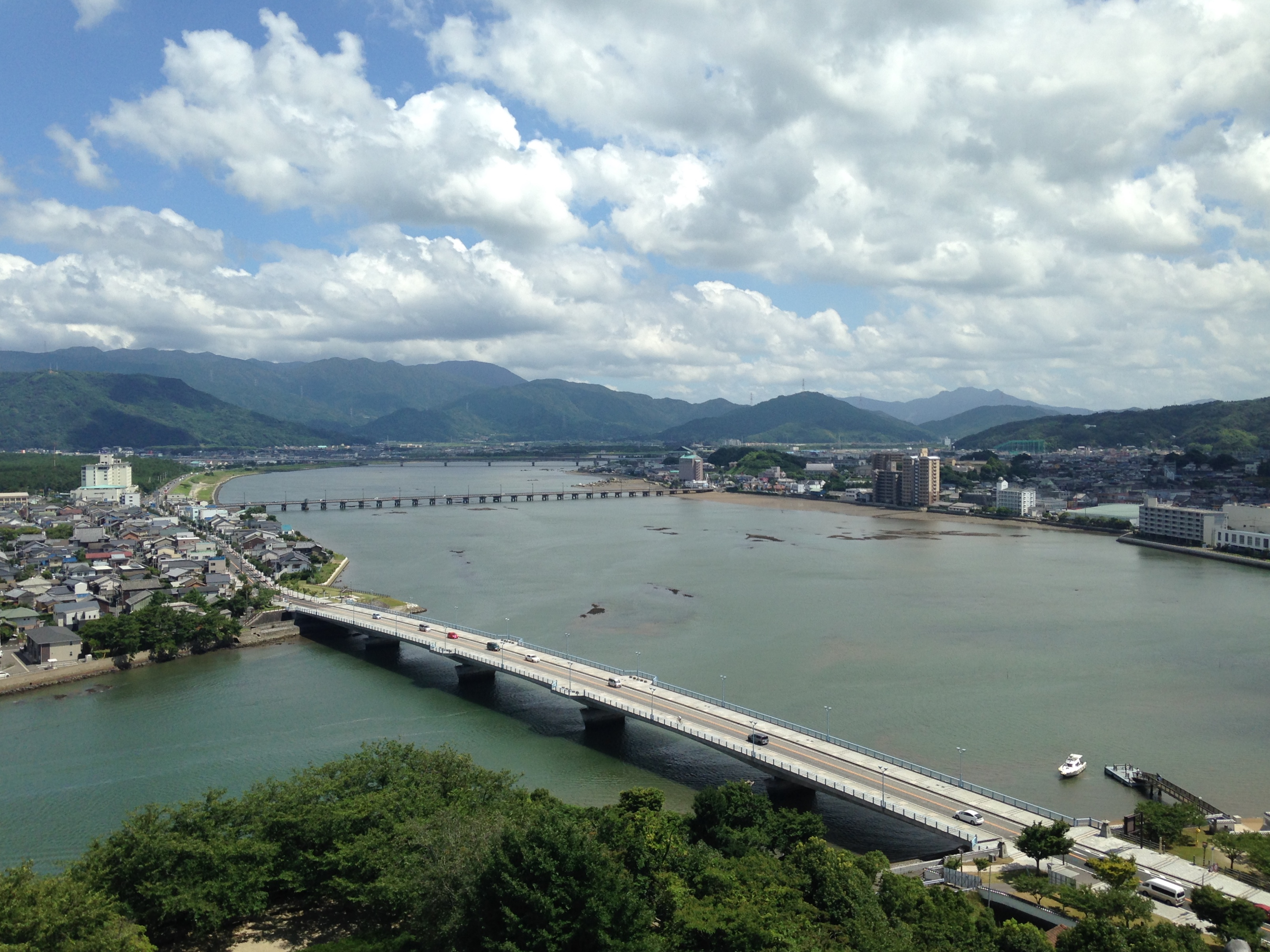 唐津城天守閣からの眺め(松浦川方面)